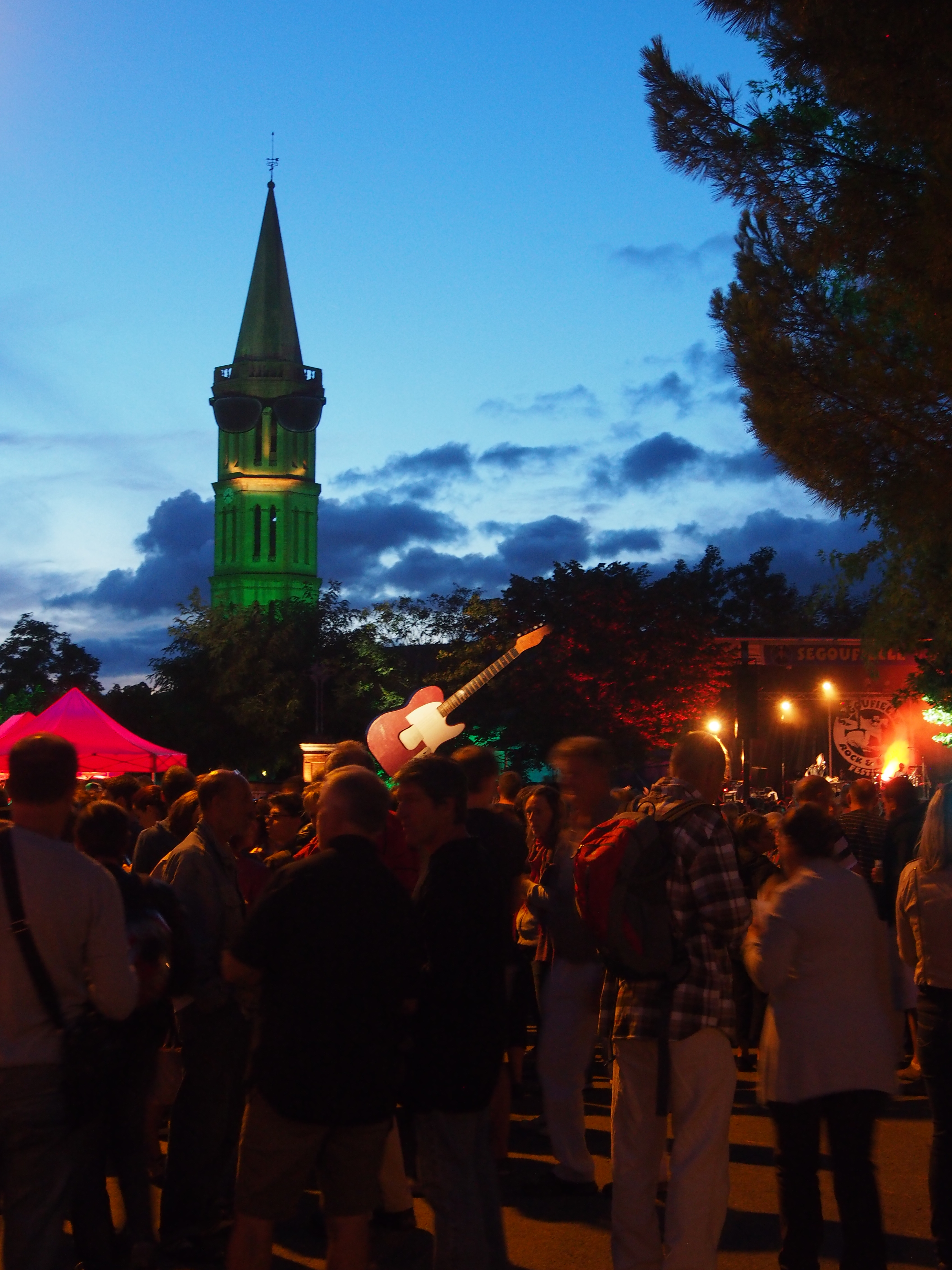 Festival de Rock & Blues de Ségoufielle (Gers, France).